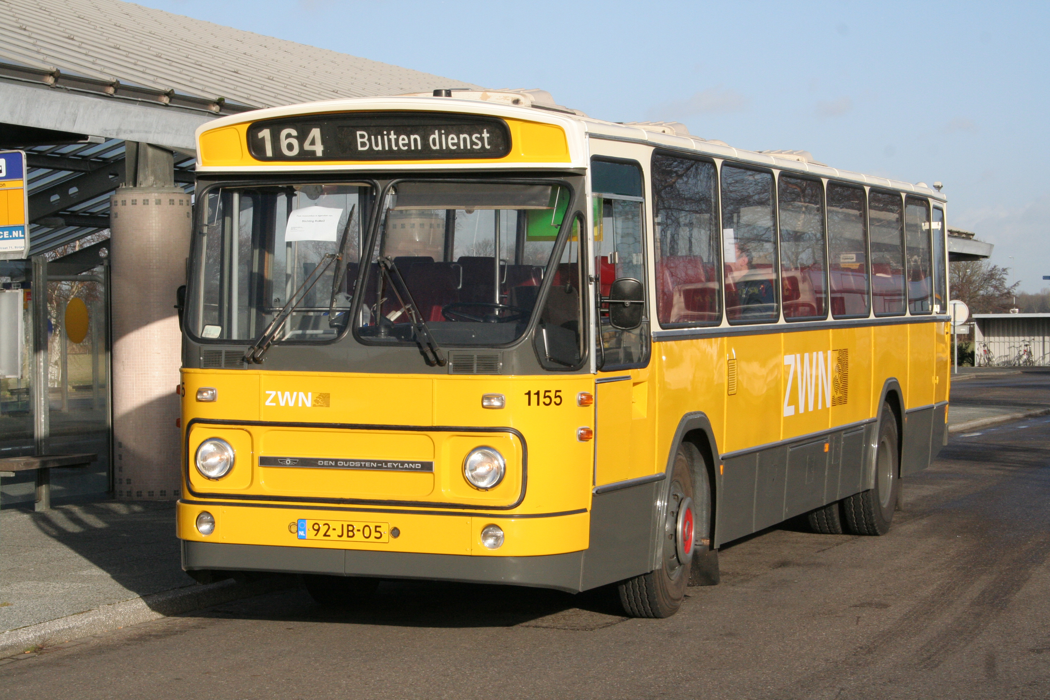 De ZWN 1155, een museumbus van Romeo Rotterdam op het busstation van Heinenoord.